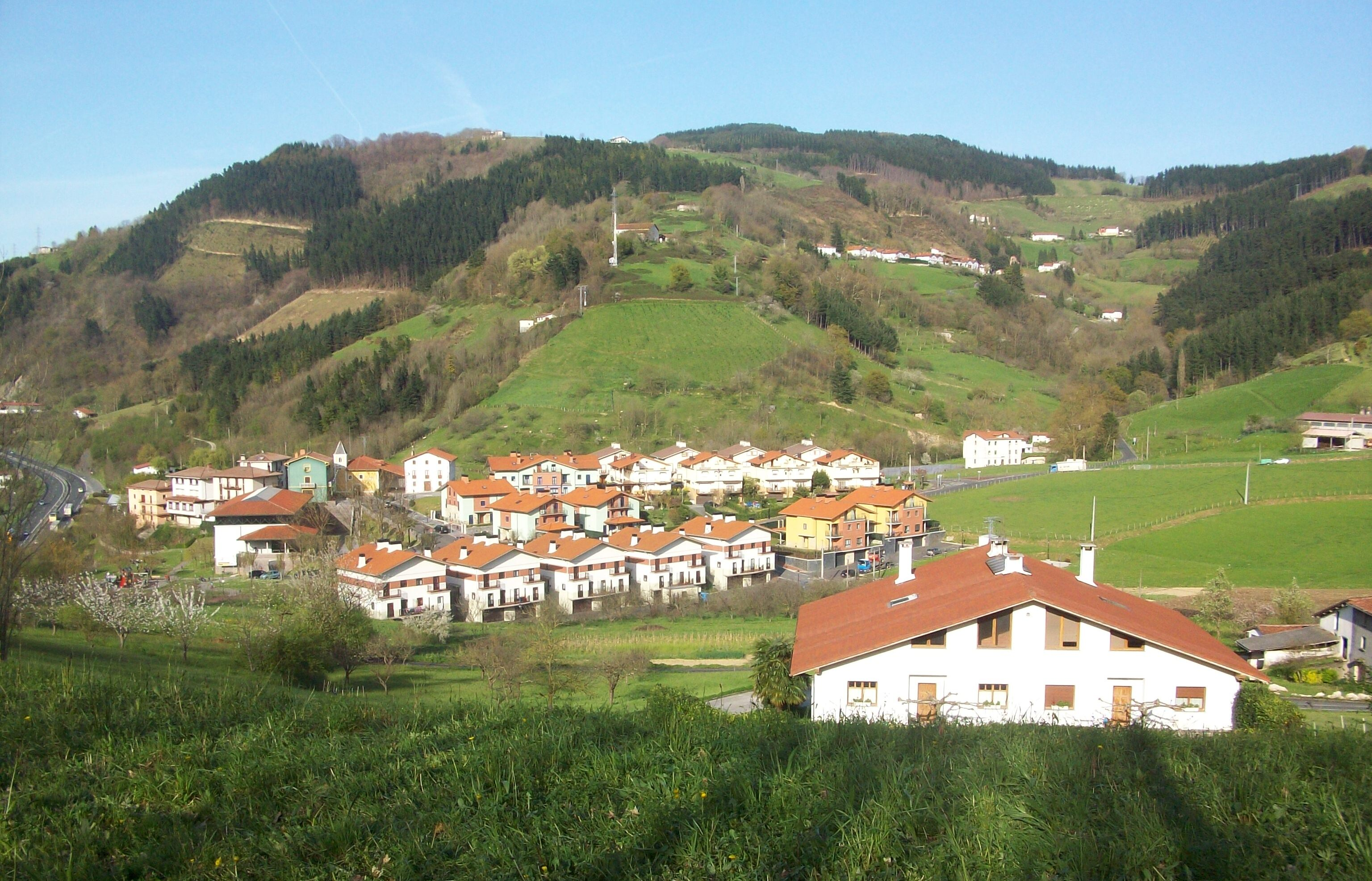 Arama. Goierri, Gipuzkoa. Euskal Herria. Arama. Goierri, Guipuscoa. Basque Country.